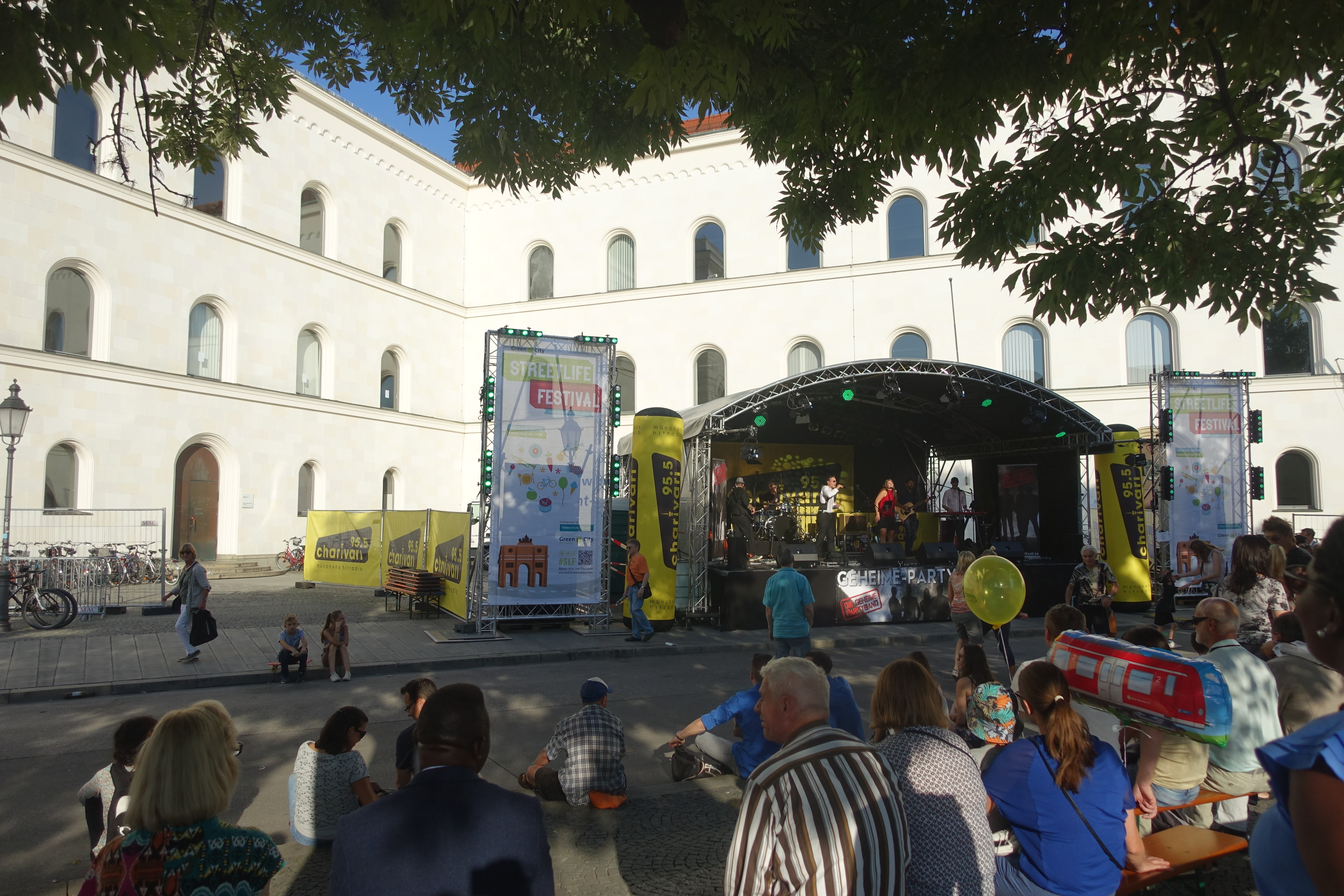 Ausschnitt des Streetlife-Festivals im September 2016